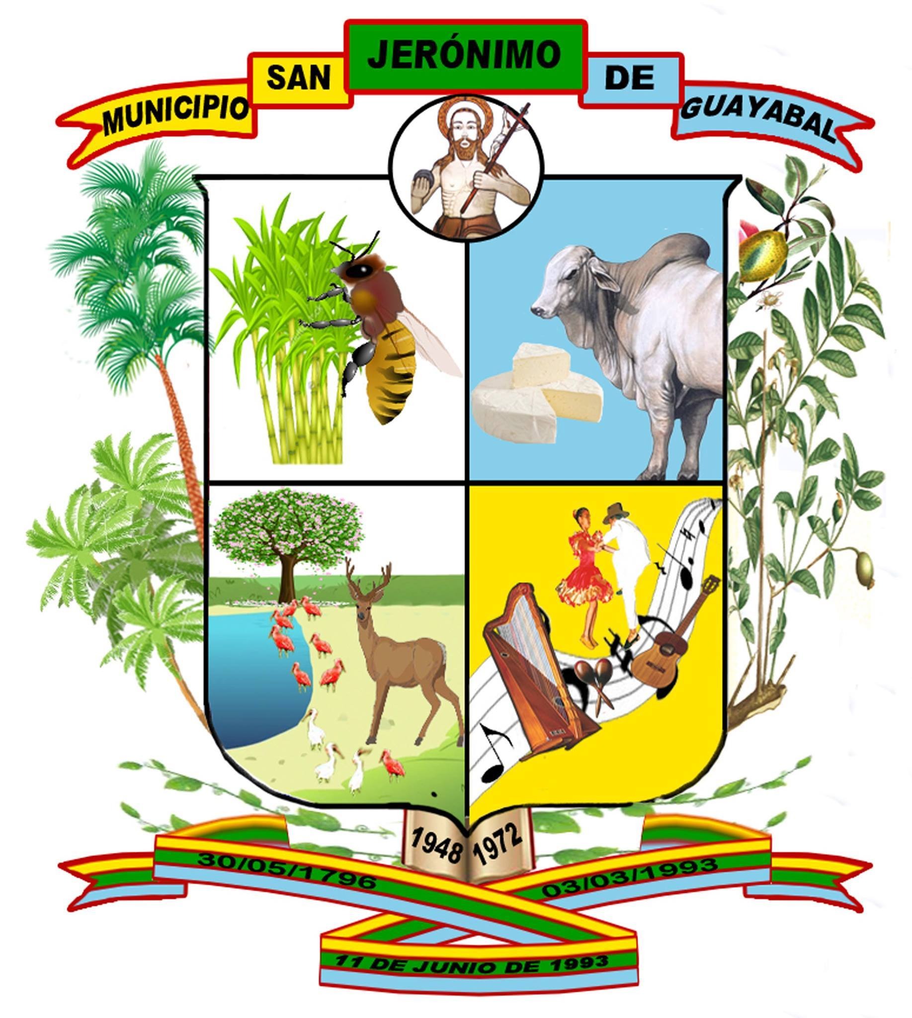 este escudo muestra gran significado, que identifica su gente, su cultura, su trabajo, constancia